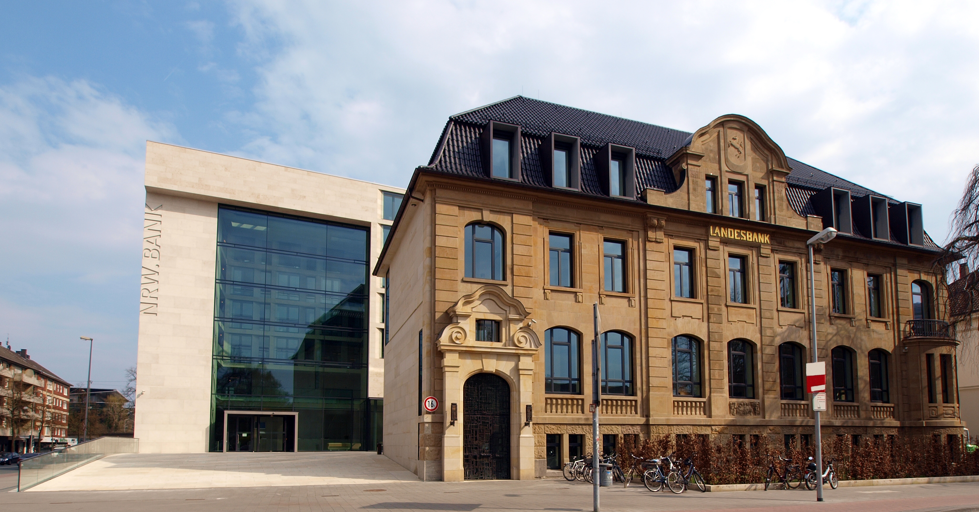 NRW.BANK in Münster Germany